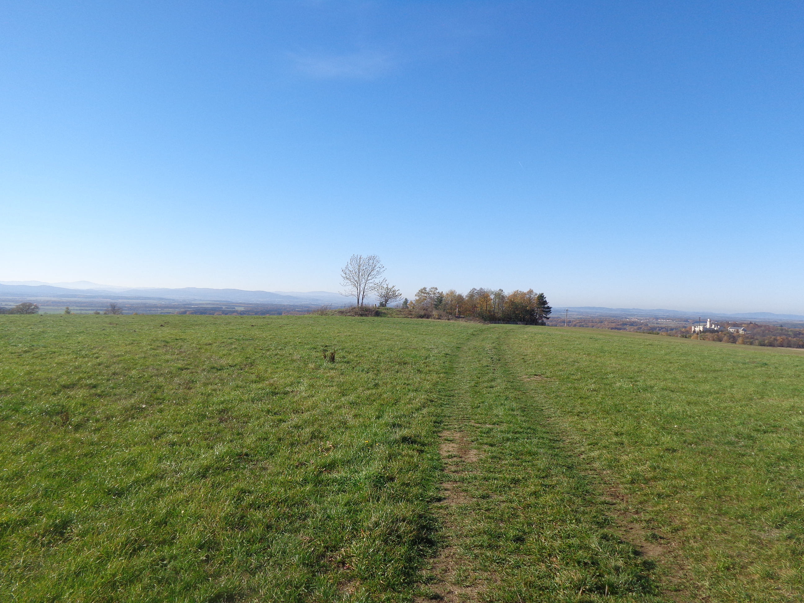 Vrch Račice v Lišovském prahu u obce Hosín